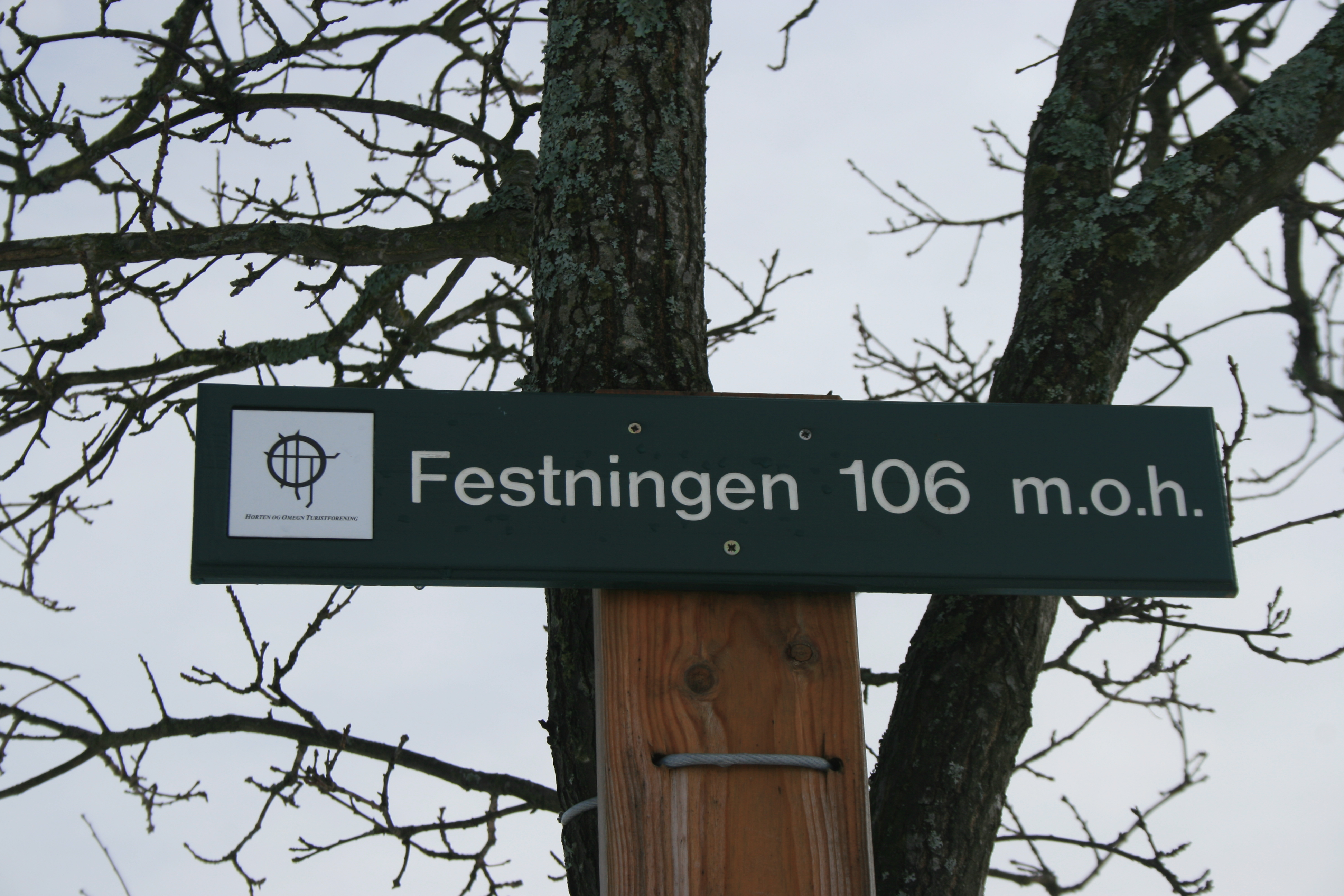 Festningen i Horten.